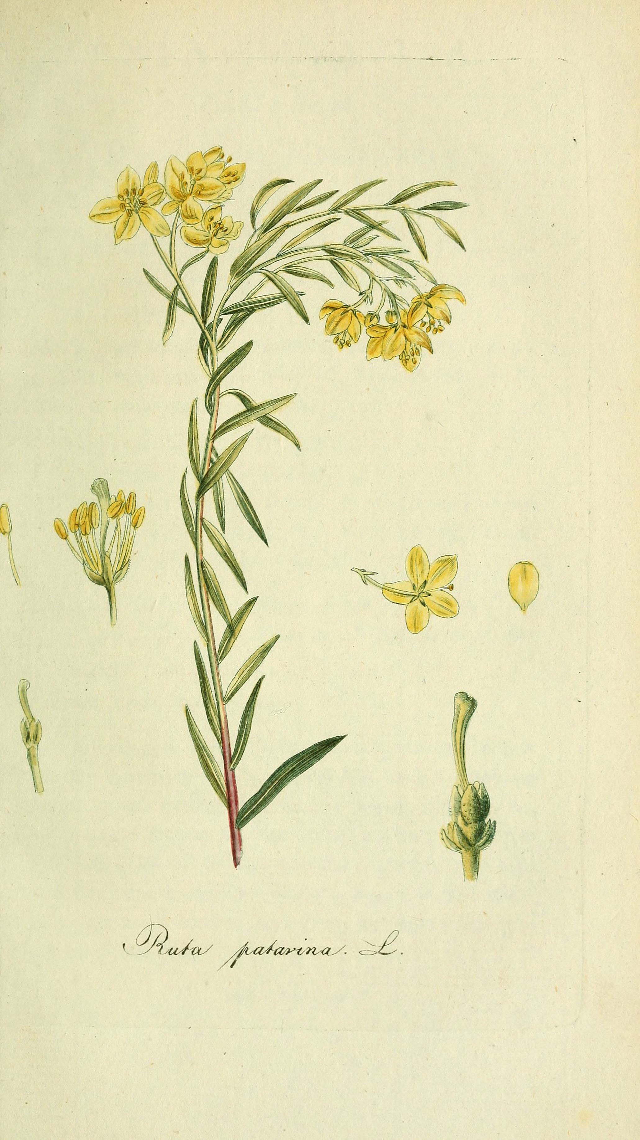 y^AuJ-ay Jva^a^t' rva^. -,£.